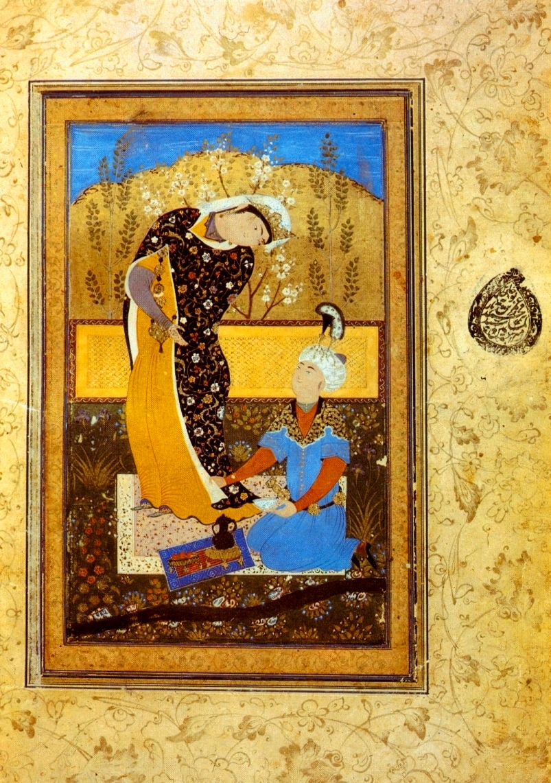 Abdulla._Влюбленные.Саади_Бустан_1575-6г_РНБ